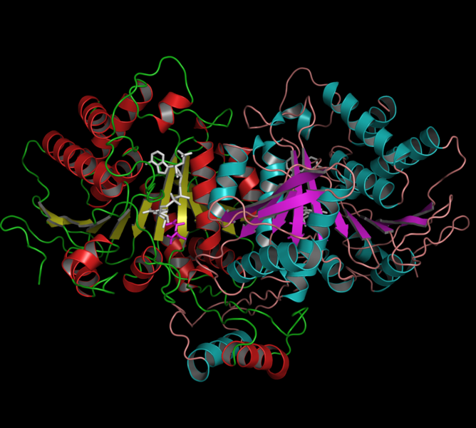 Summary Bildbeschreibung: Isocitrat-Dehydrogenase (Quartärstruktur) mit Isocitrat (magenta) und NAD (weiss), isoliert aus E. coli. Untereinheit I rote Helices, gelbe Faltblätter, Untereinheit II cyanfarbene Helices, magentafarbene Faltblätter. Quelle: selbst erstellt. Fotograf/Zeichner: Minutemen Datum: 24. April 2006 Sonstiges: Abbildung erstellt aus pdb 1AI3 ( mit pymol 0.99